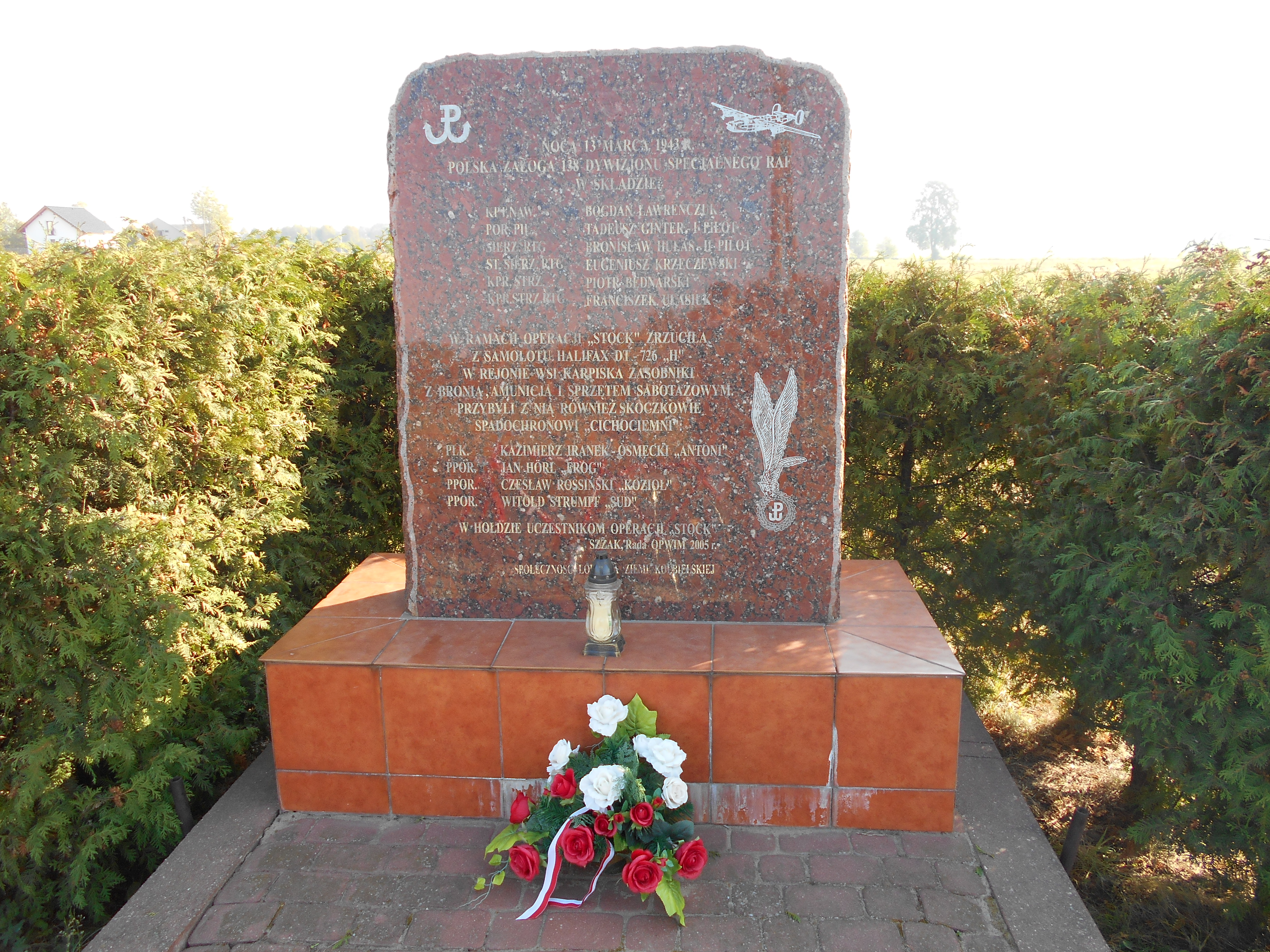 Tablica w Karpiskach